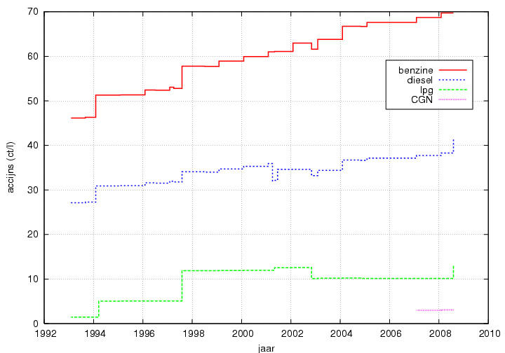 accijns per liter voor motorbrandstoffen